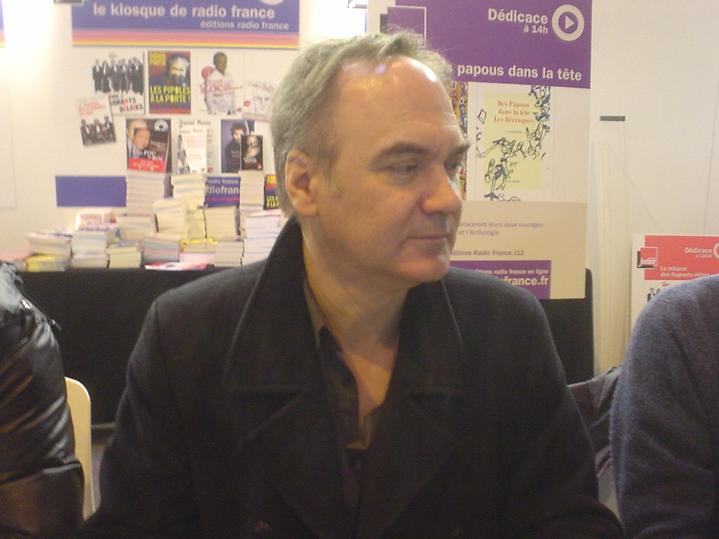 Hervé Le Tellier au séminaire de La Paillette en mars 2020.